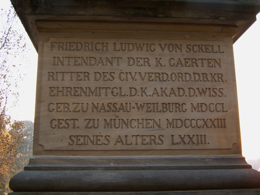 Bildbeschreibung: Inschrift auf der Gedenksäule für Ludwig von Sckell im Englischen Garten, München, am Kleinhesseloher See. Quelle: Privataufnahme Fotograf/Zeichner: Florian Fell vom 30.10.2005 und von diesem hochgeladen Datum: 31.10.2005